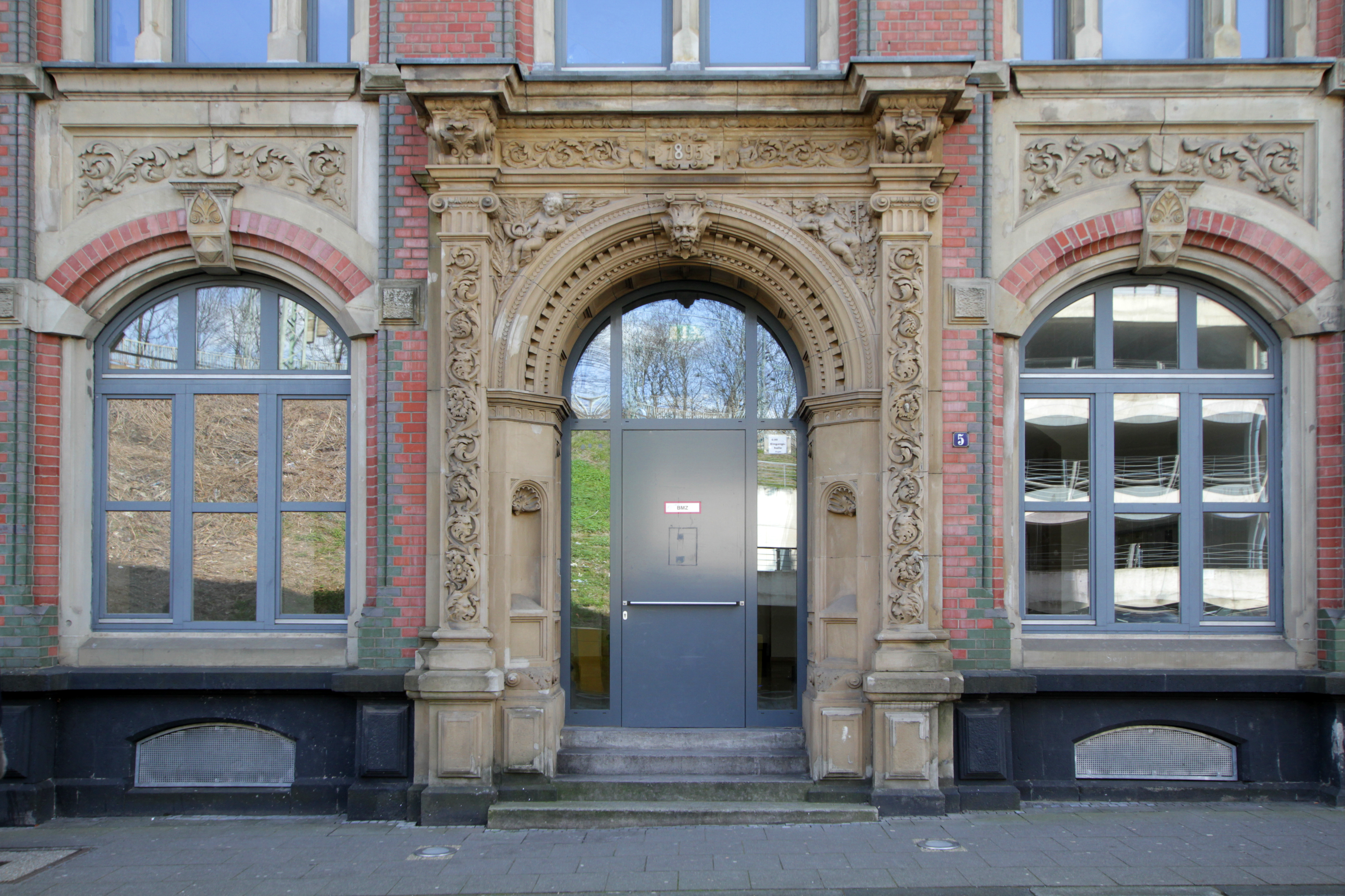 Köln-Neustadt-Nord, Gladbacher Wall 5. Ehemaliges Postamt für Frachtgut von 1895 This is a photograph of an architectural monument.